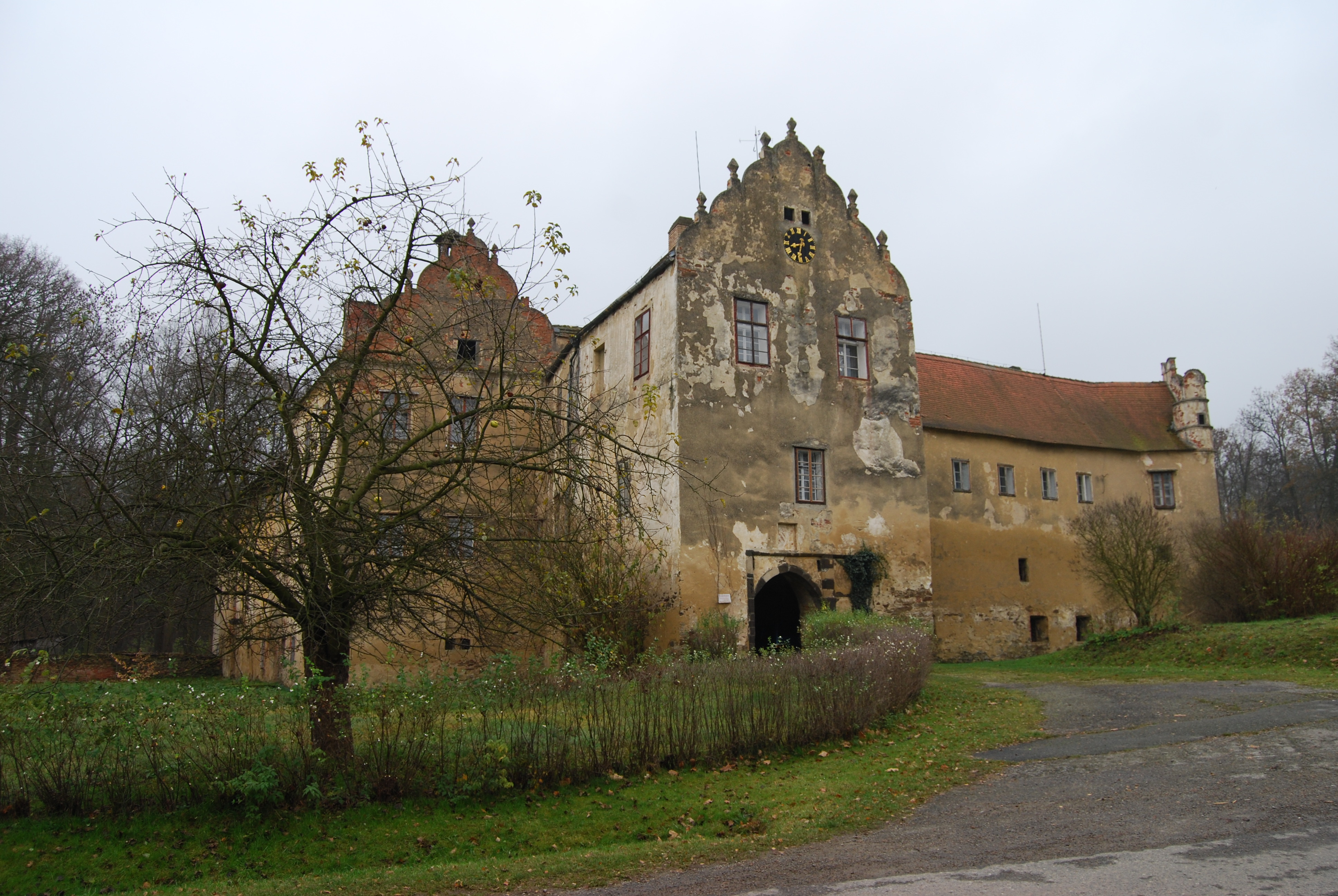 Starý zámek Libějovice. Libějovice se nachází v okrese Strakonice v Jihočeském kraji. Česká republika.